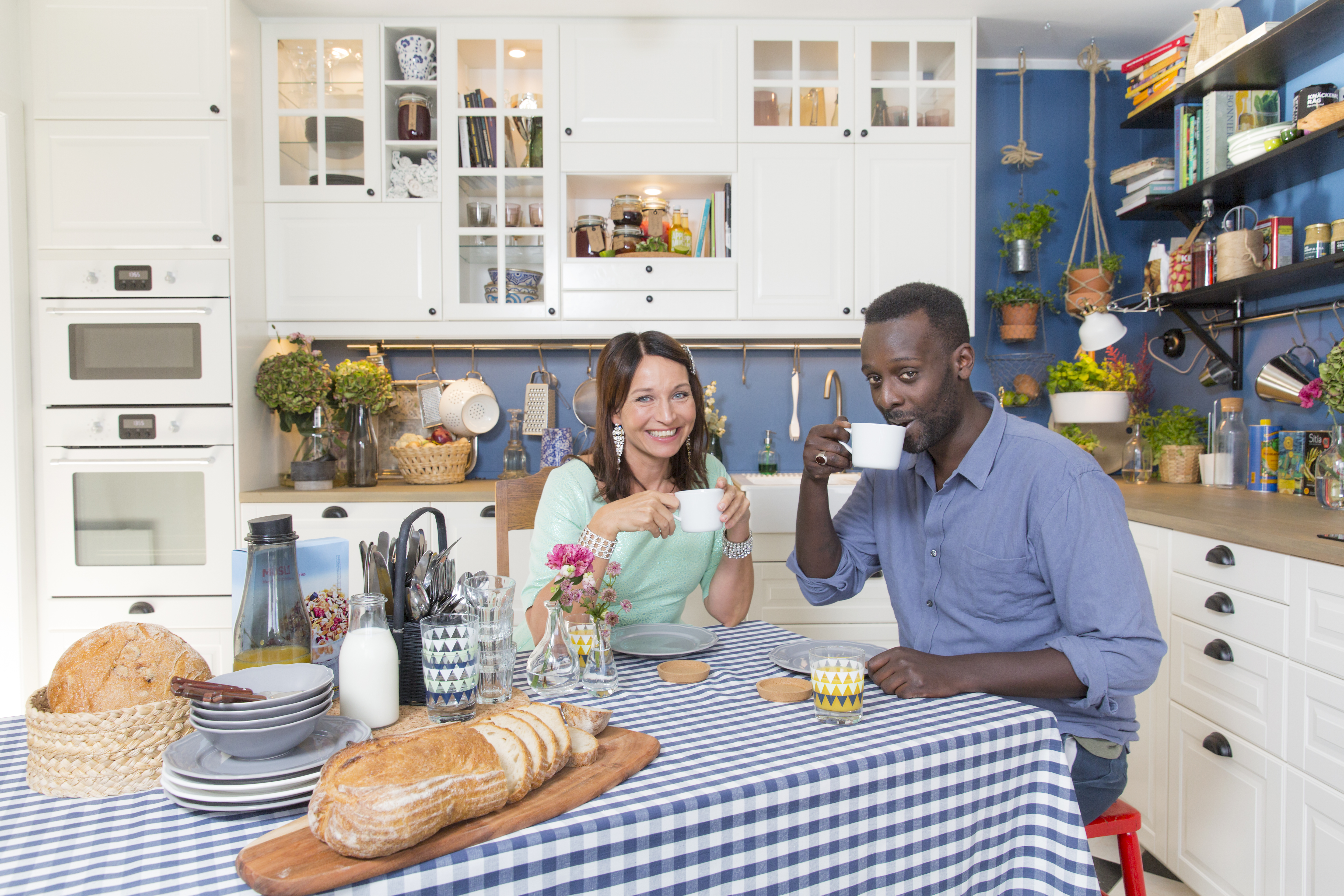 Martina Haag och Mogge Sseruwagi i en reklamkampanj för IKEA.